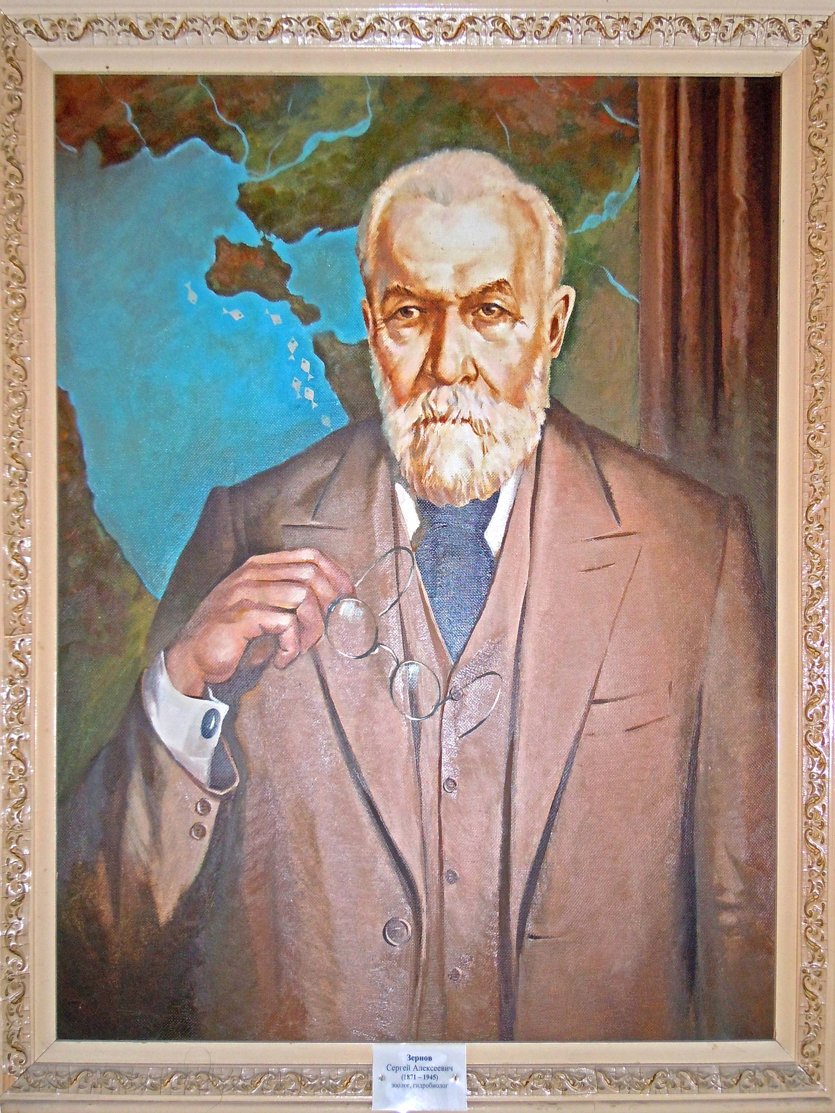 Зернов Сергій Олексійович